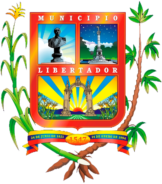 Escudo Oficial del Municipio Libertador del Estado Carabobo